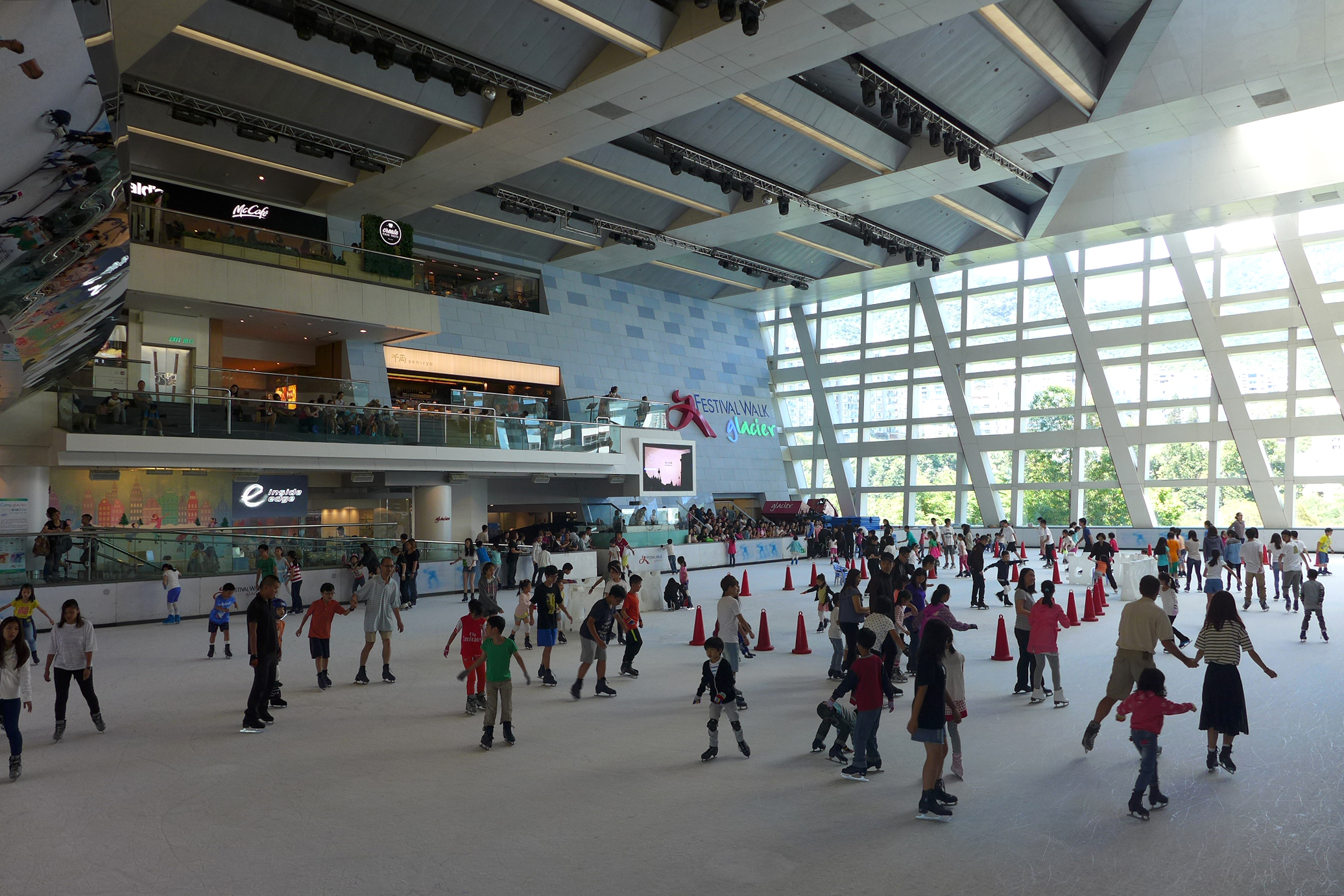 Festival Walk Ice Skating Rink